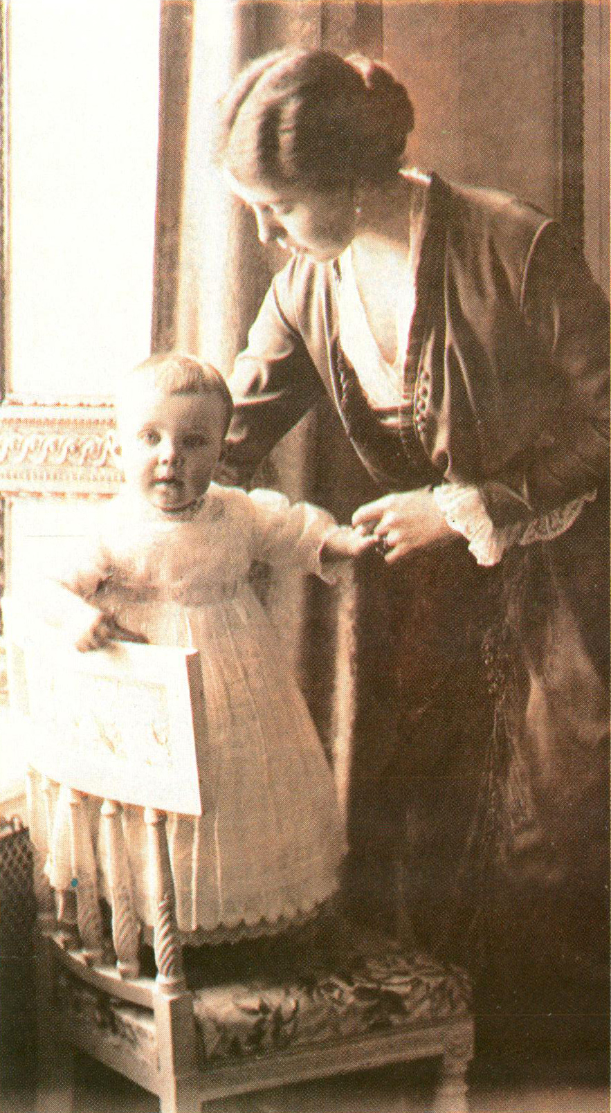 Prinsessan Margareta med sin son prins Bertil.